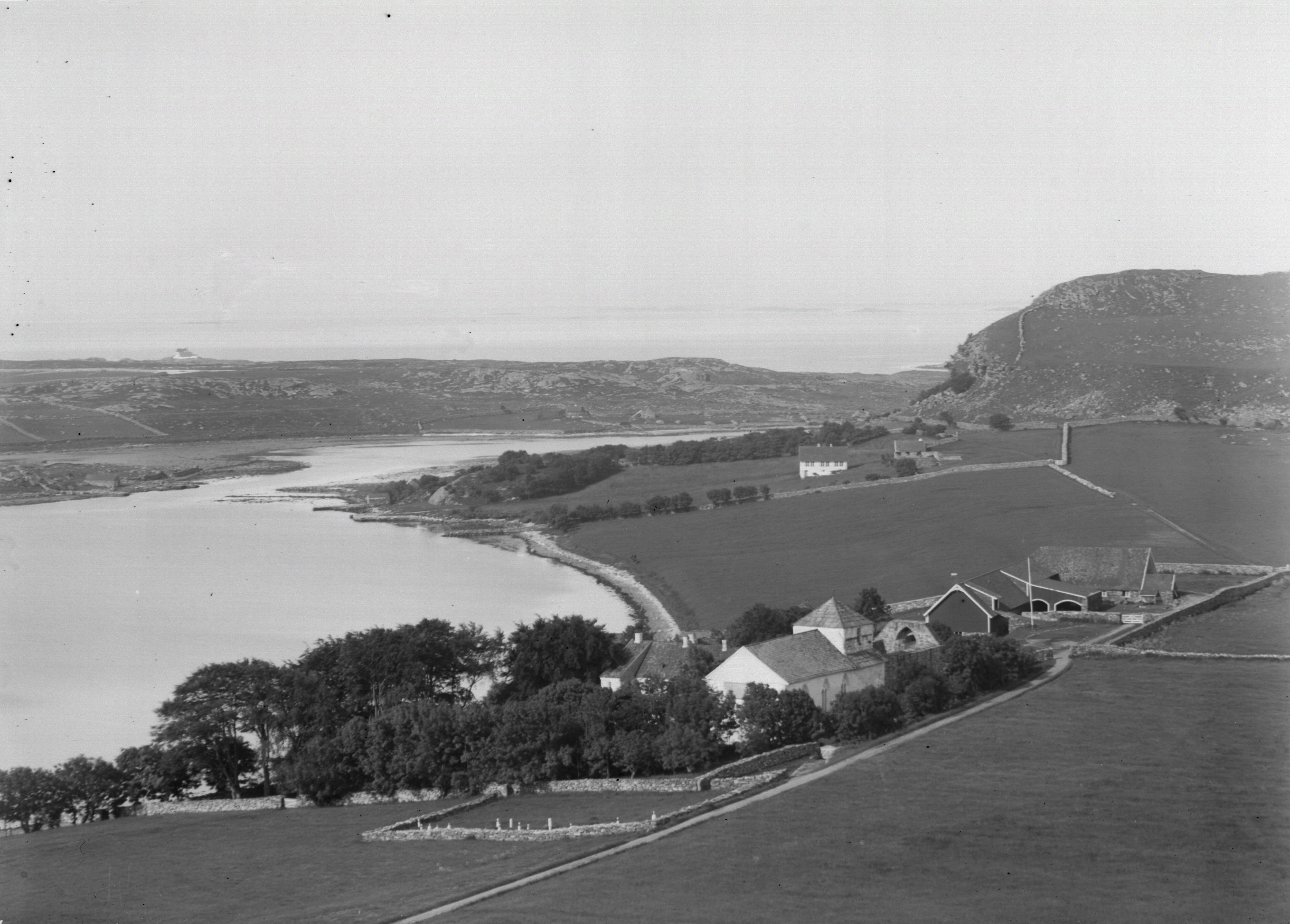 Utstein kloster i Mosterøy, Rogaland Klosteret sett fra Ravnefjell.